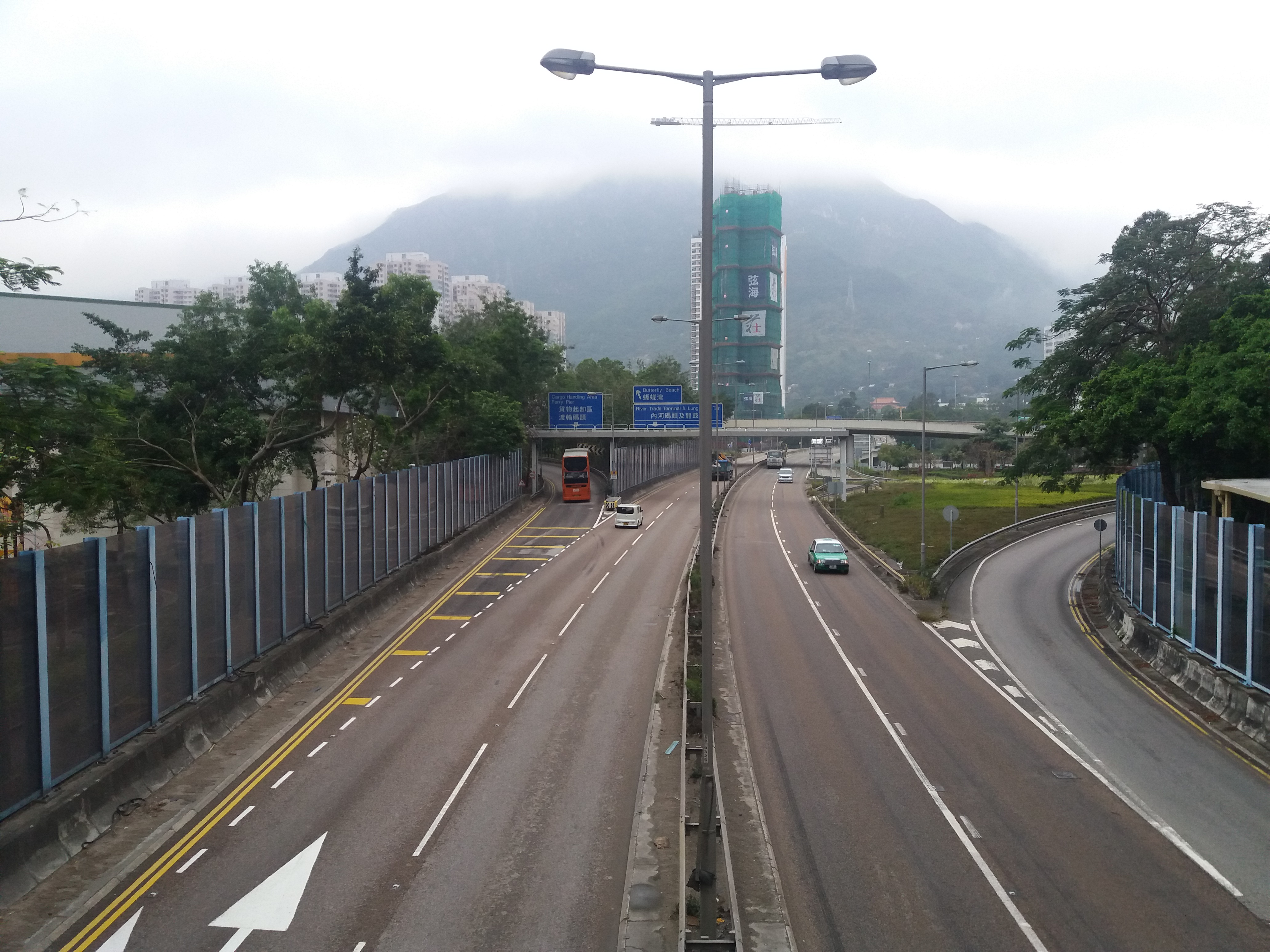 中文（香港）: 皇珠路近友愛邨一段